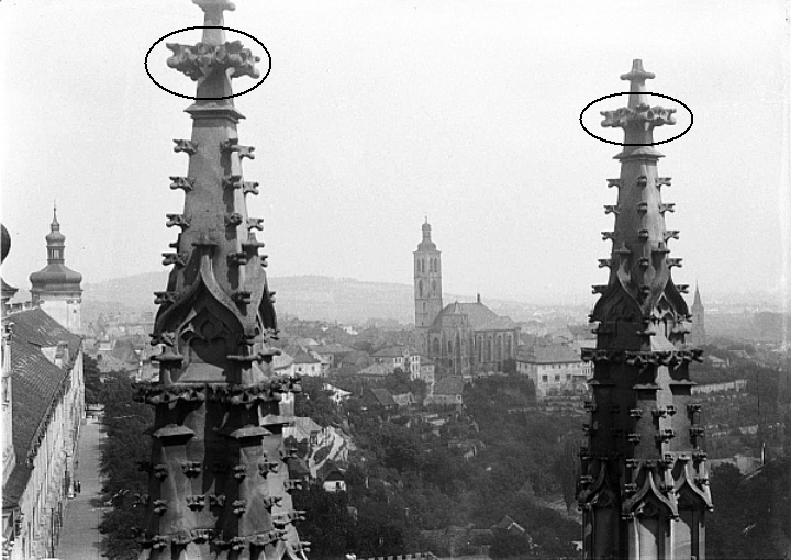 Zakroužkované křížové kytky na fiálách chrámu sv. Barbory v Kutné Hoře.